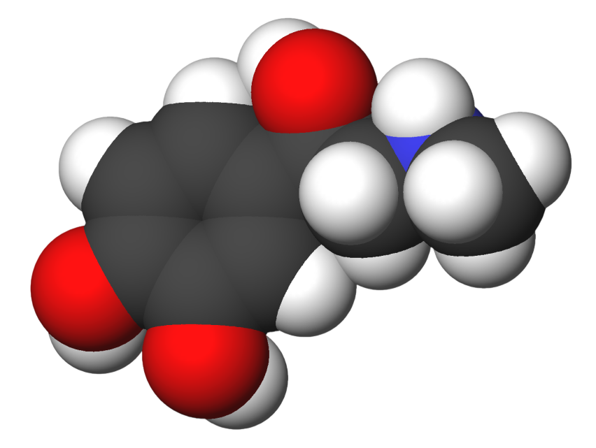 Epinephrine